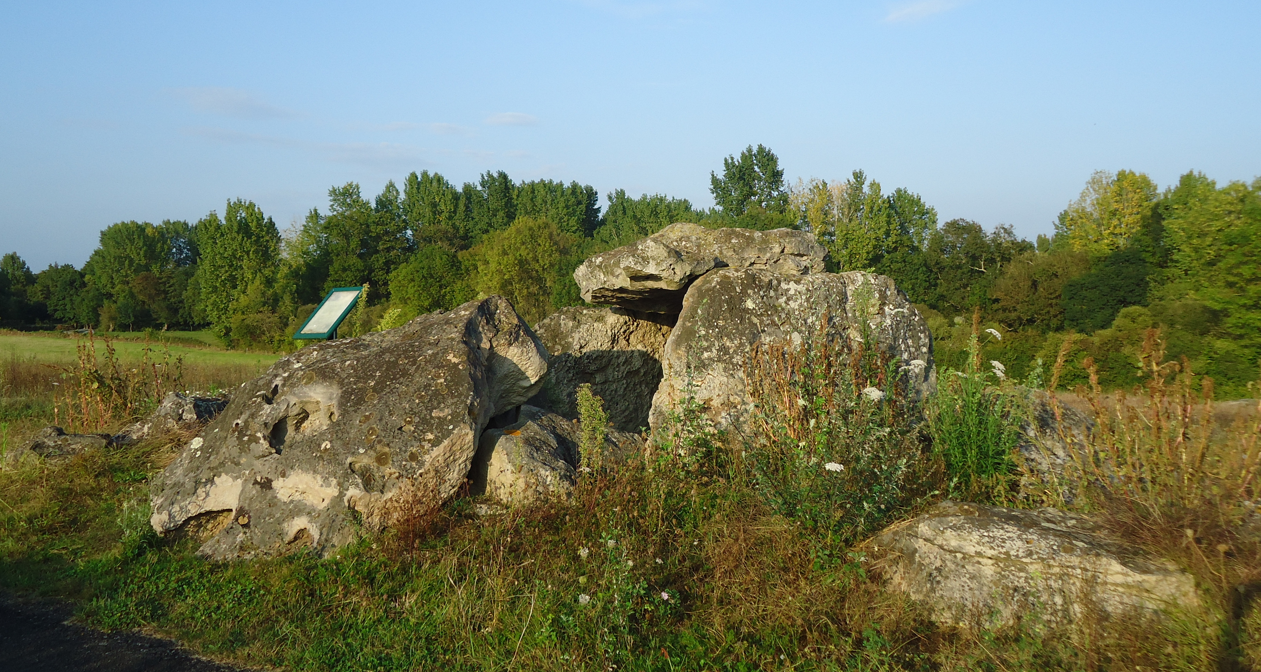 Dolmen d'Amenon - Saint-Germain-d'Arcé - Sarthe (72)